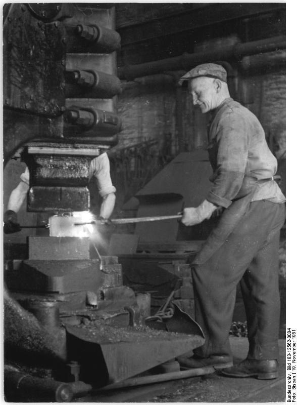 Industriearbeiter an Schmiedehammer arbeitend Selbstverpflichtung der Werktätigen zum Monat der deutsch-sowjetischen Freundschaft UBz: Der Aktivist Karl Appel arbeitet an einem Schmiedehammer der SAG Maschinenbau Mackensen in Magdeburg. "ich hatte bisherimmer nur 2 Dinge im Auge" erklärt er, "die Planerfüllung und die Qualität meiner Arbeit. An den Schmiedhammer, a die Maschine ahbe ich nicht viel gedacht. Als jetzt im Monat der deutsch-sowjetischen Freundschaft auch über Nina Nasarowa gesprochen wurde, habe ich mir das erste mal Gedanken über die Maschinenpflege gemacht. Ich habe mich verpflichtet, meine Maschine in persönliche Pflege zu nehmen. Ich hoffe, dadurch jeden Asusschuß beseitigen zu können." Aufn.: Illus Biscsan Berlin W 8 642. A.V. 19.11.1951 Leu-We.